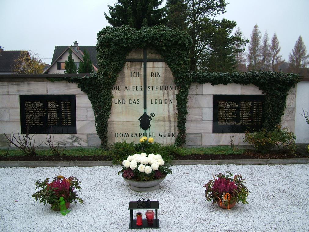 Grab Bischof Paulitsch